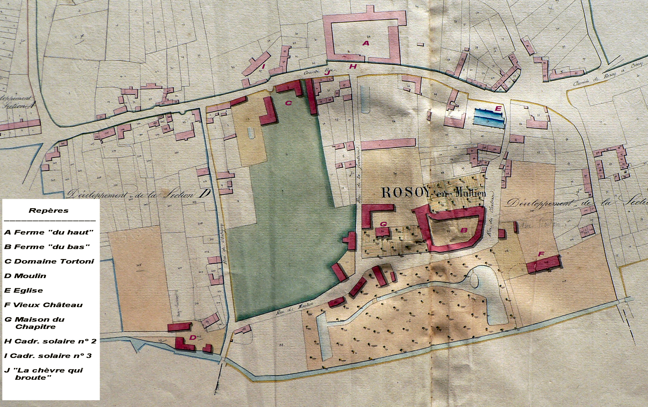 Repérage de quelques lieux cités